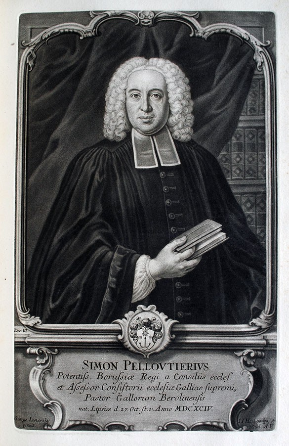 Simon Pelloutier (1694–1757), deutscher Historiker und Antiquar